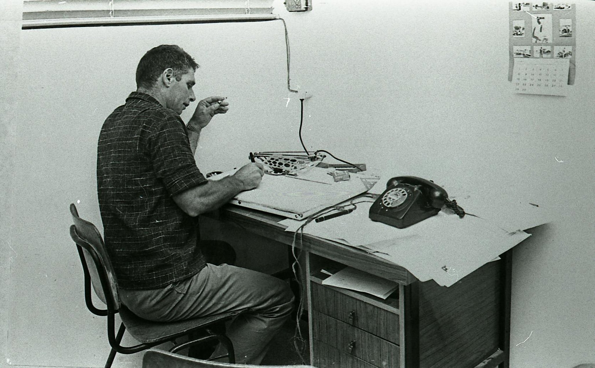 גולן מהנדס בקרה - משרטט לוחות חשמליים